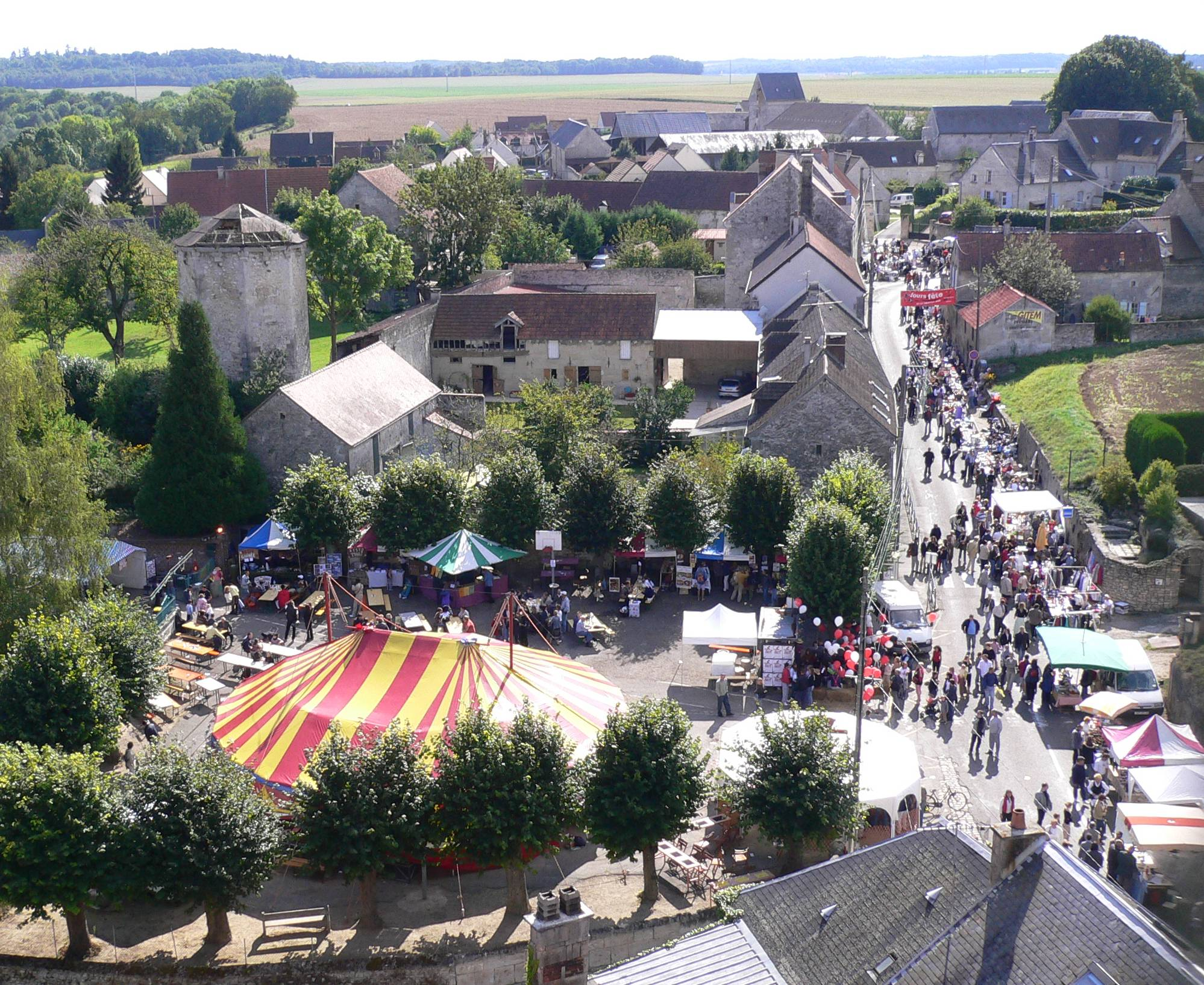 Grand rue de Feigneux photographiée depuis le clocher lors de Jours de fête Feigneux 2005(Fête Citoyenne qui a lieu tous les ans au mois de septembre.